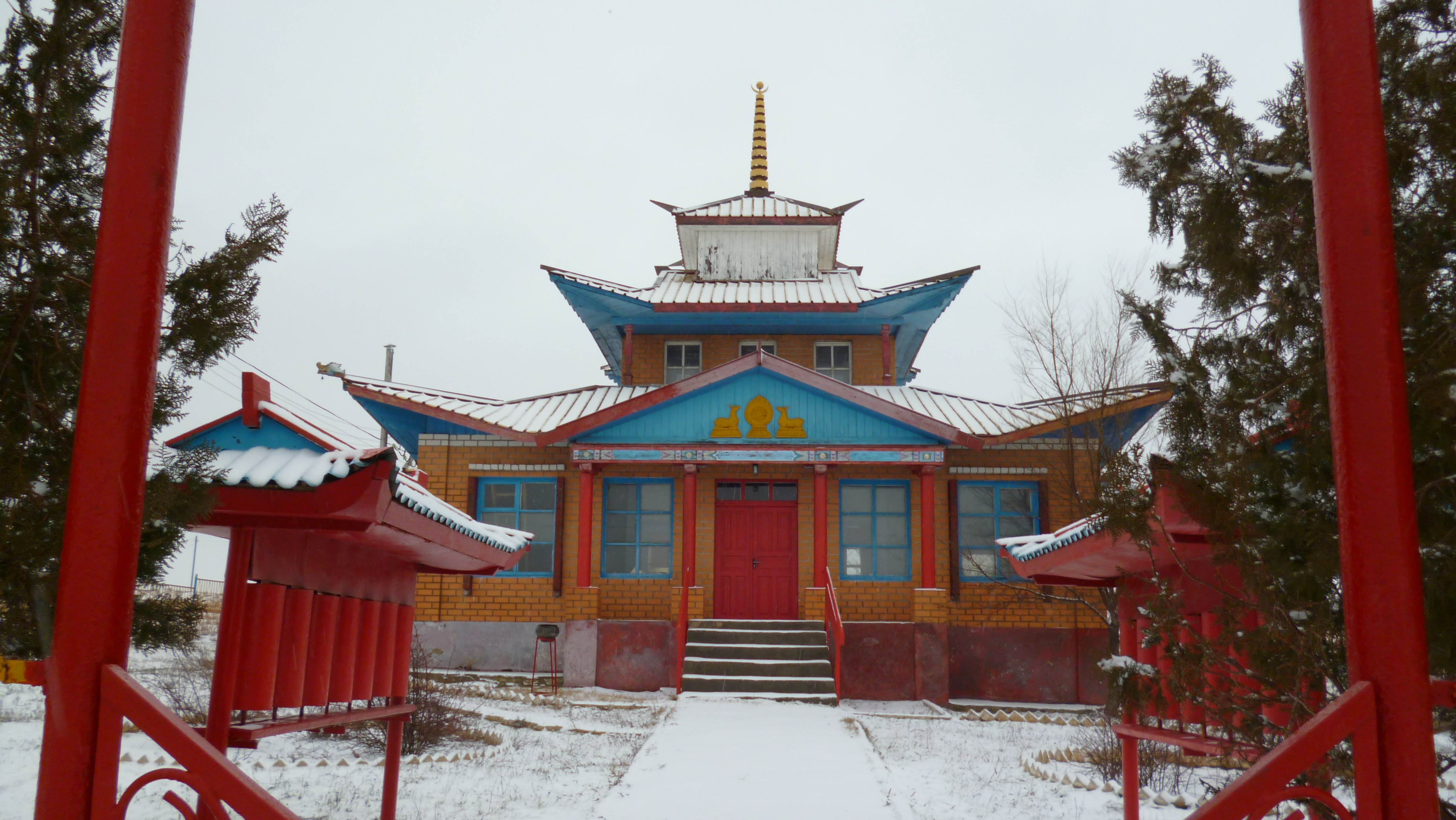 Чёёря-хурул, Ики-Чонос, Целинный район, Калмыкия